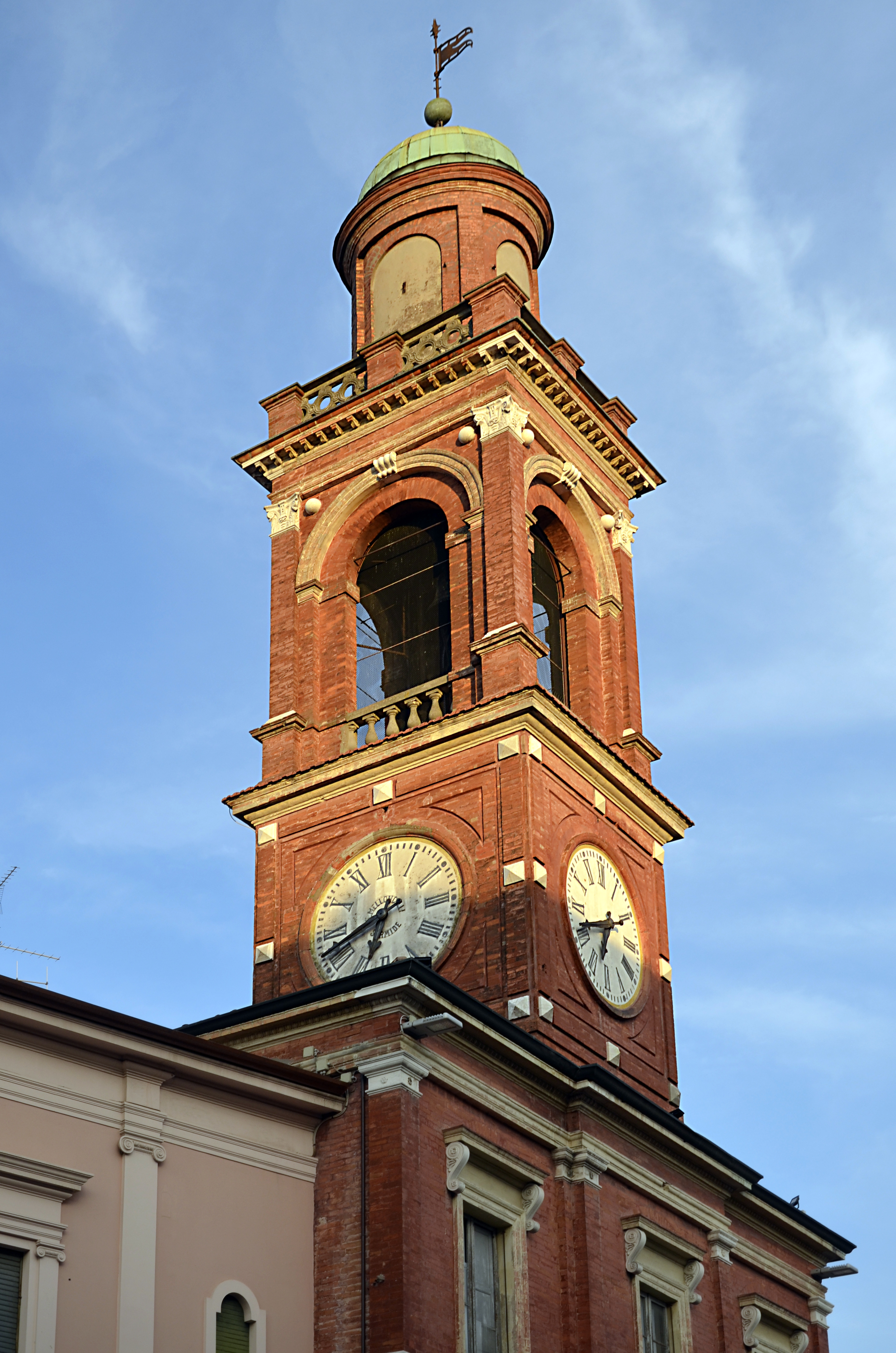 Torre dell'orologio di Russi